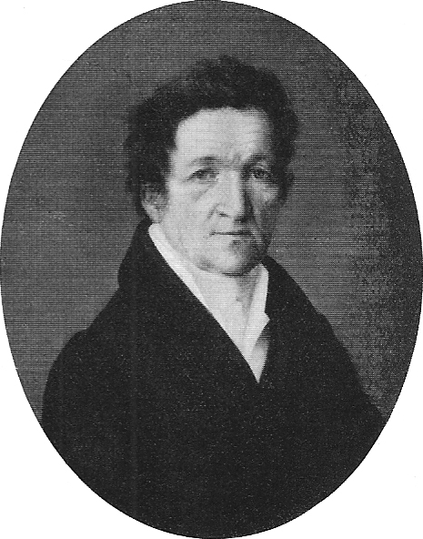 Christian von Vellnagel [Staatssekretär, Oberhofratspräsident] (Elfenbeinminiatur 72×57 mm)